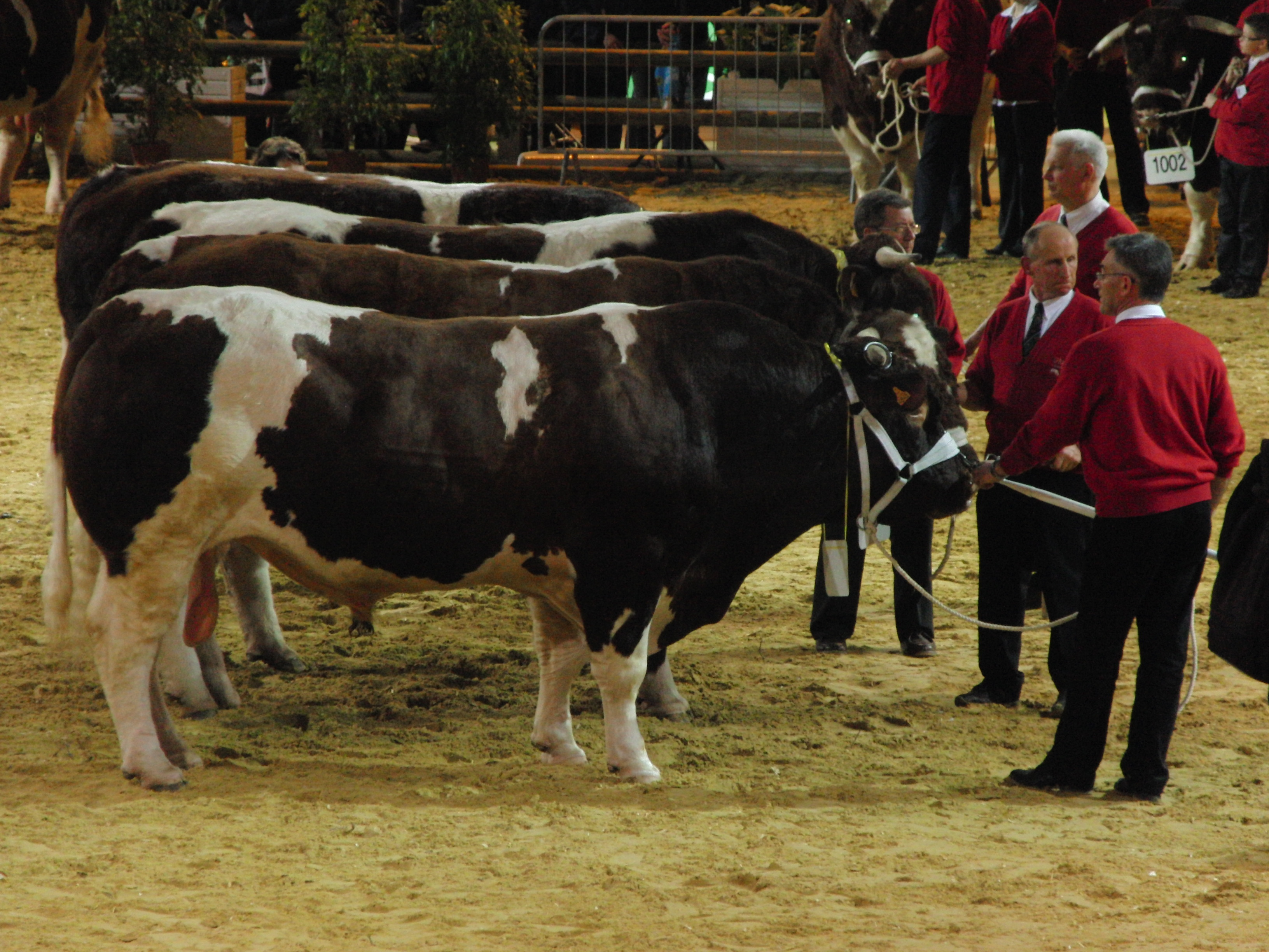 Taureaux de race Rouge des prés présentés au Salon international de l'agriculture 2010